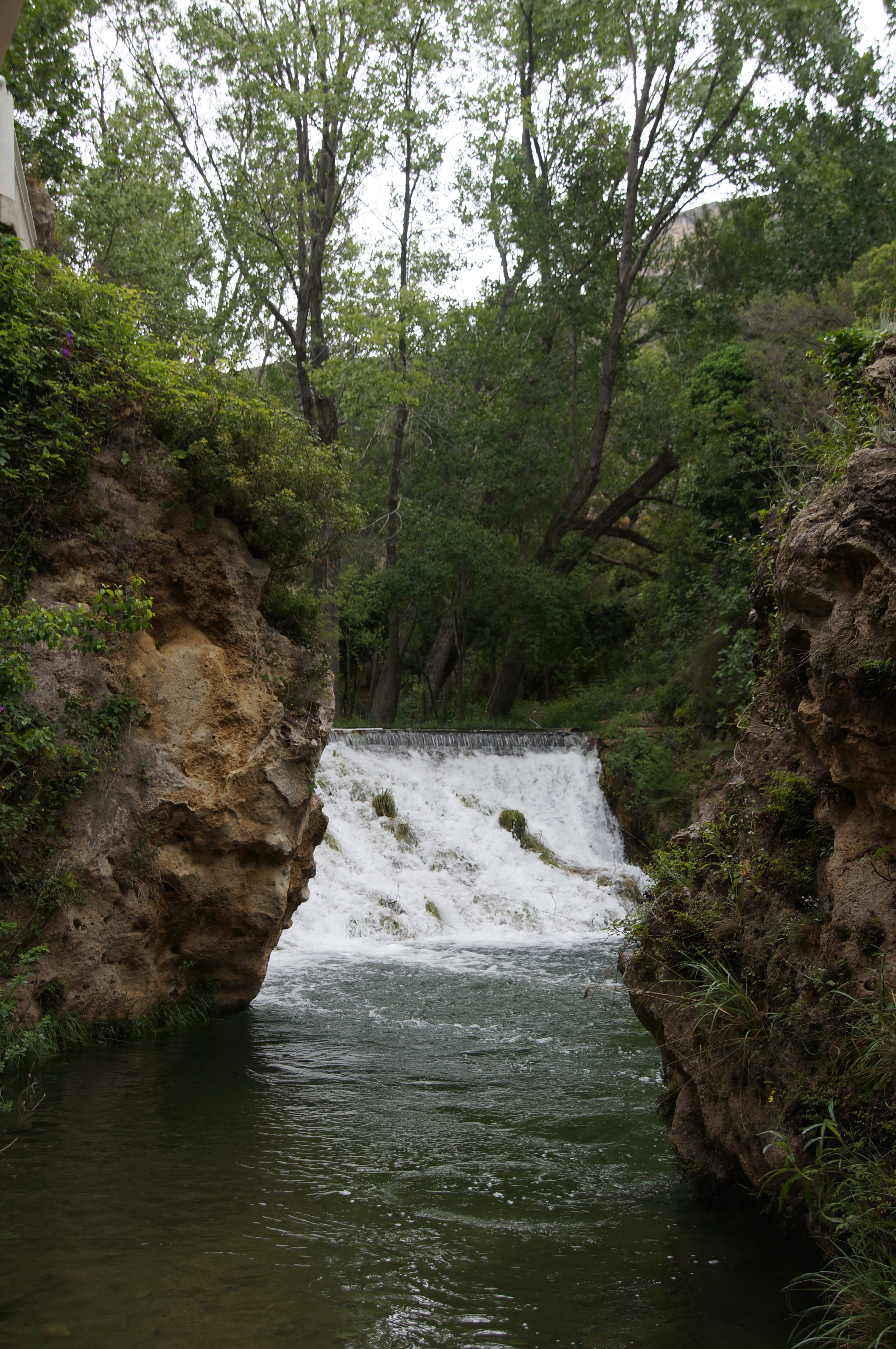 Parc Natural de la Tinença de Benifassà This is a a photo of a natural area in the Land of Valencia, Spain, with id: ES520047